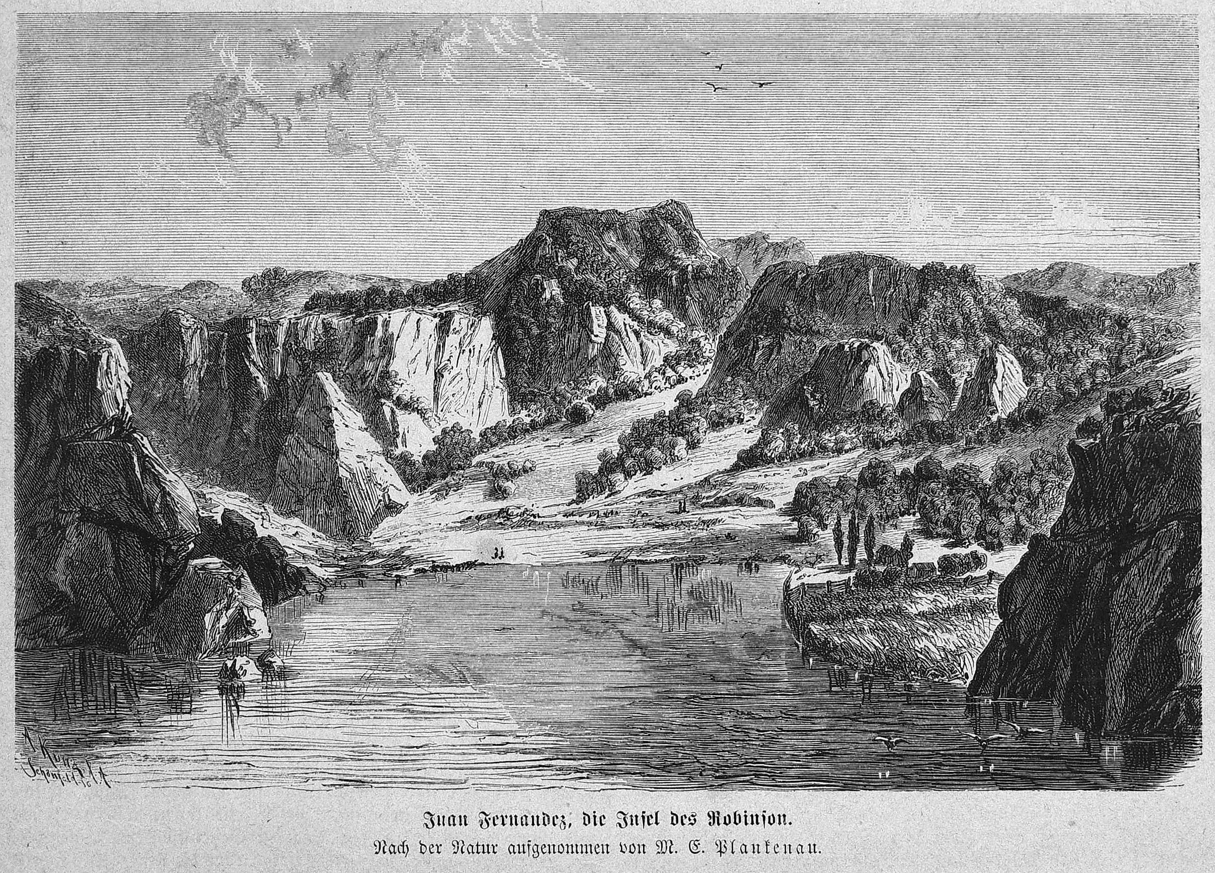 Bild von Seite 801 der Zeitschrift Die Gartenlaube. Image from page 801 of journal Die Gartenlaube, 1871.